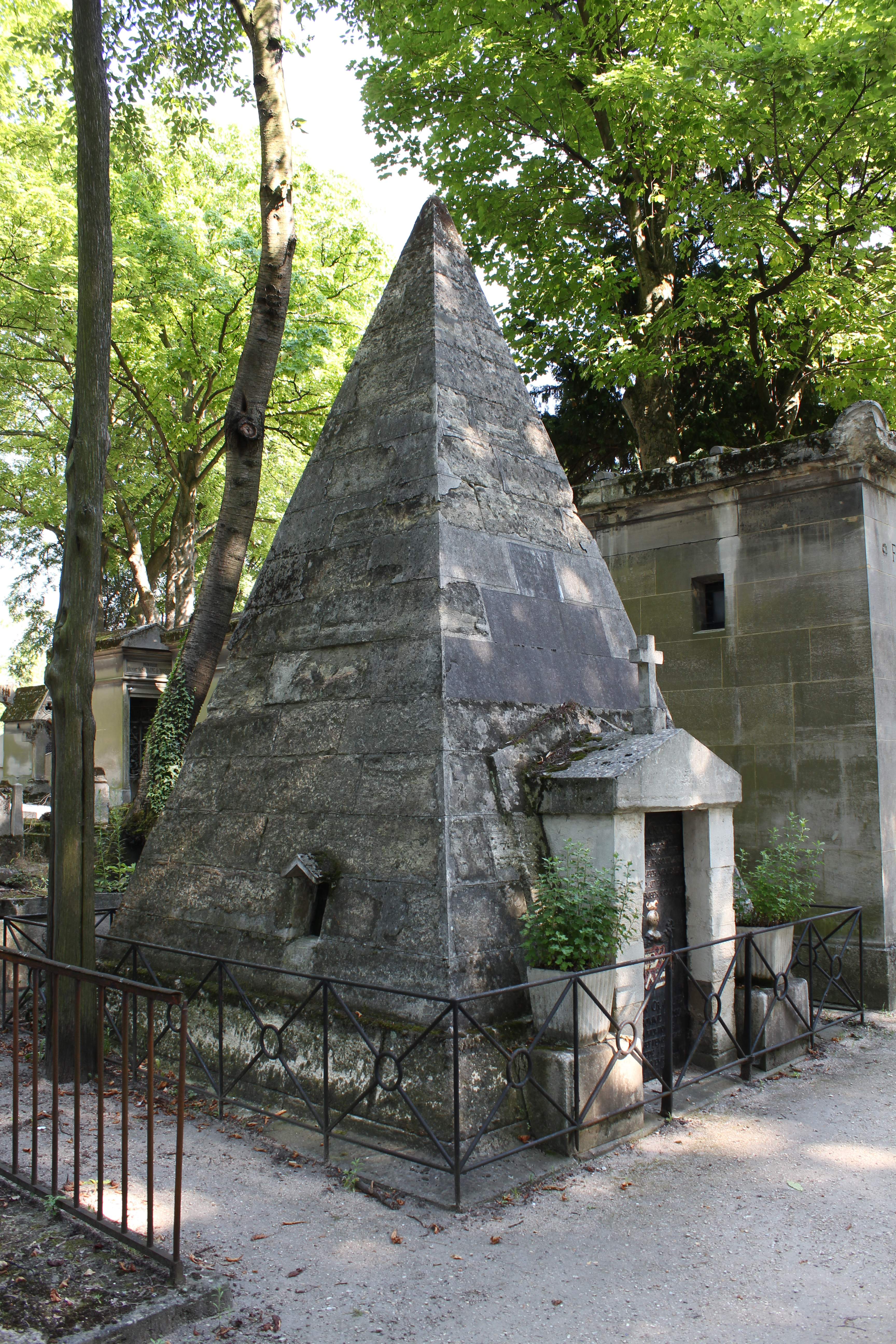 Vue d'ensemble